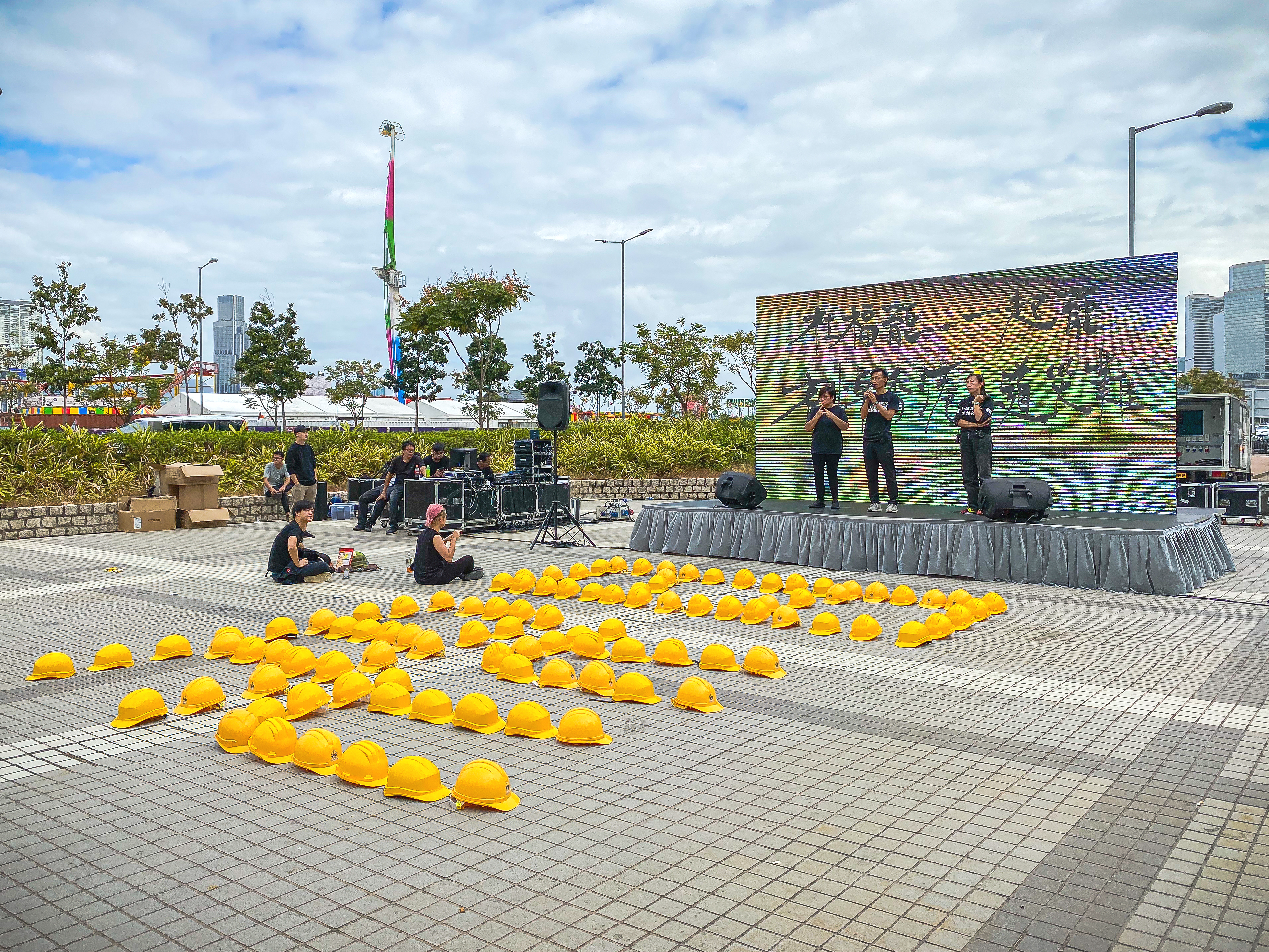 2019.12.17 社福界罷工